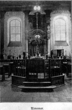 Synagoga w Białej